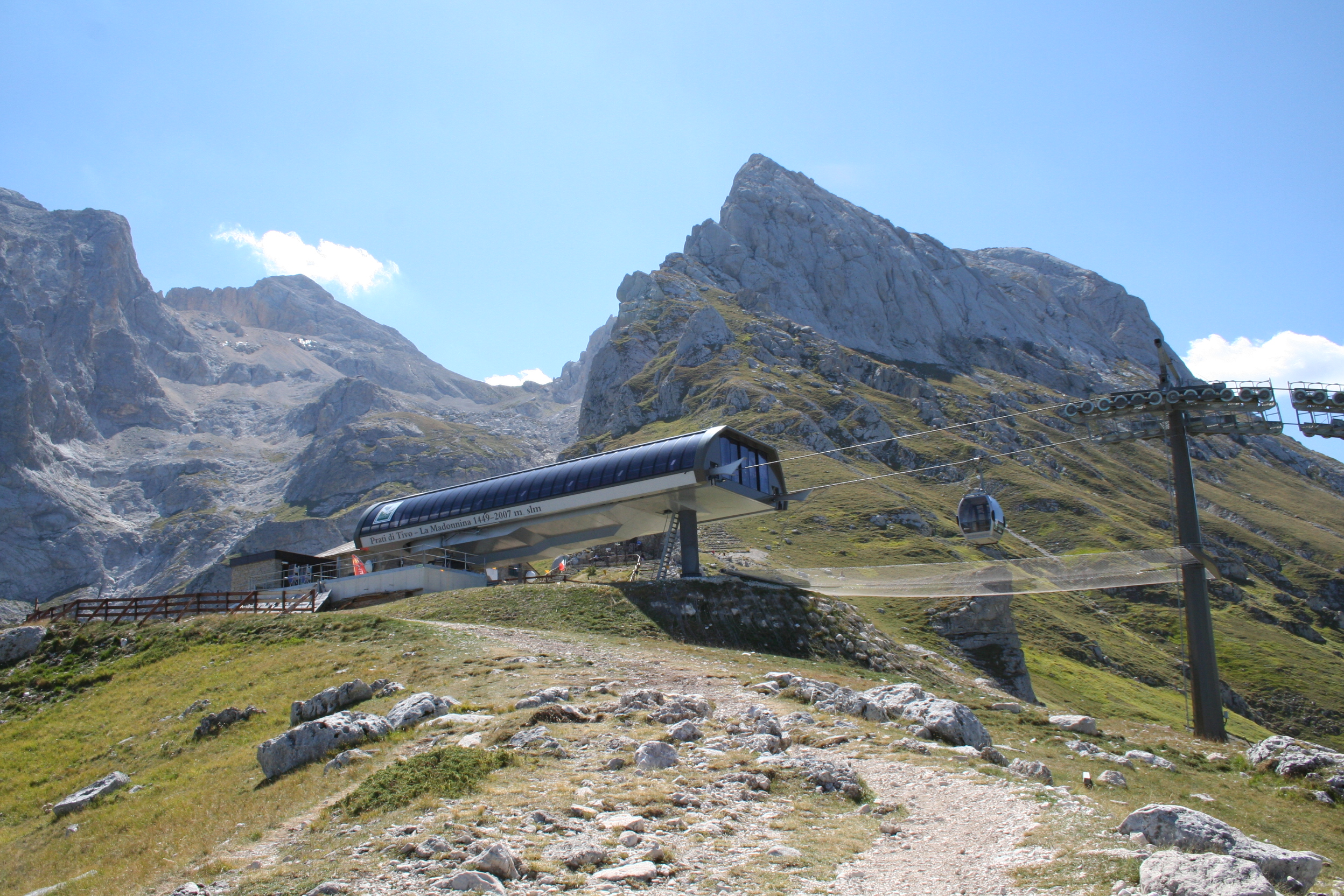 Prati di Tivo. Cabinovia "La Madonnina" in località Arapietra.